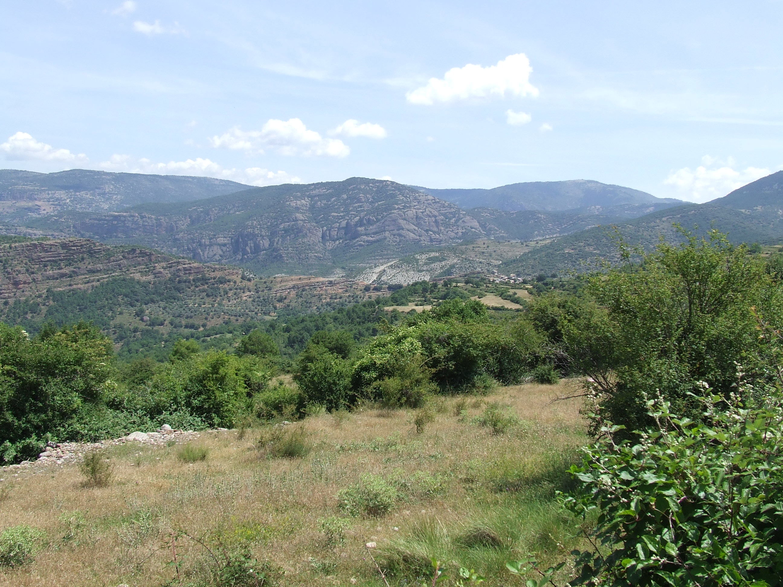 El Cap de l'Alt de Baiarri en el seu entorn (Claverol, Conca de Dalt, Pallars Jussà)